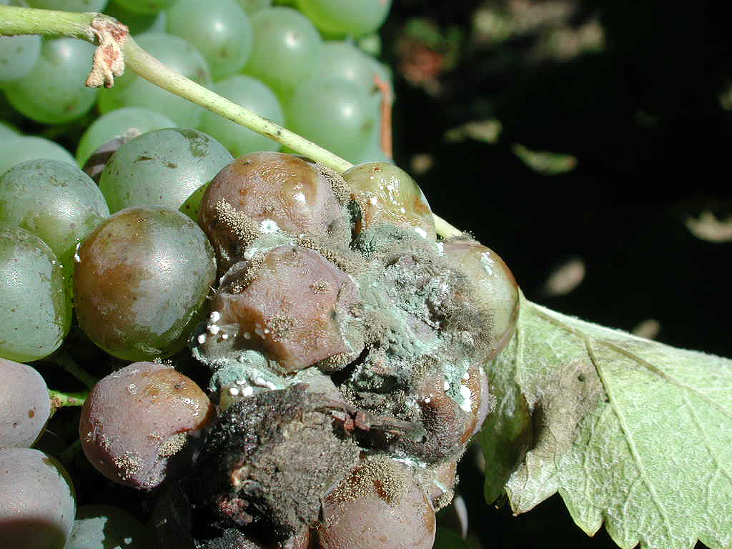 Grünfäulebefall (penicillium exp.) auf einer Traube